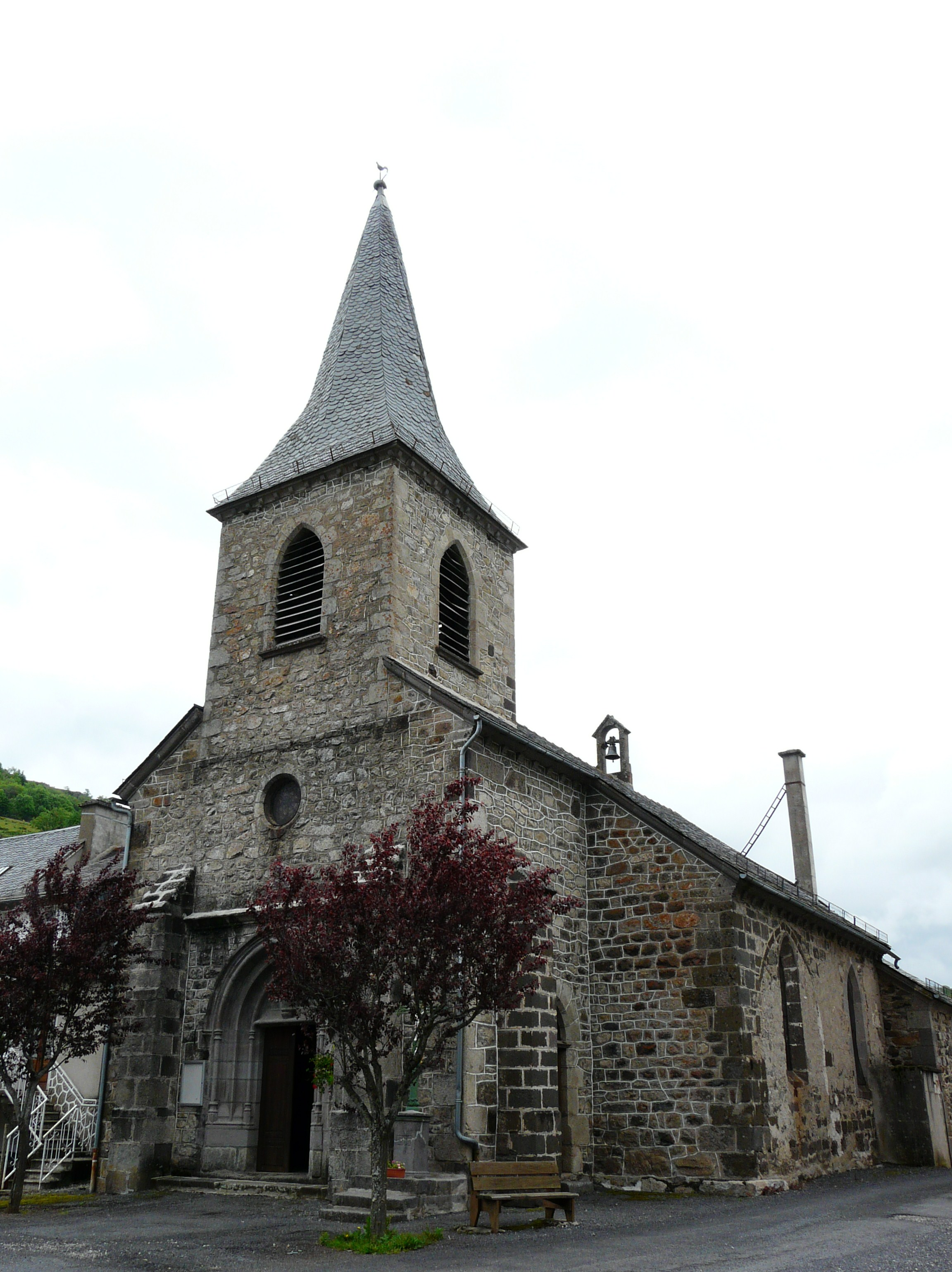 L'église de Saint-Bonnet-de-Condat, Cantal, France.